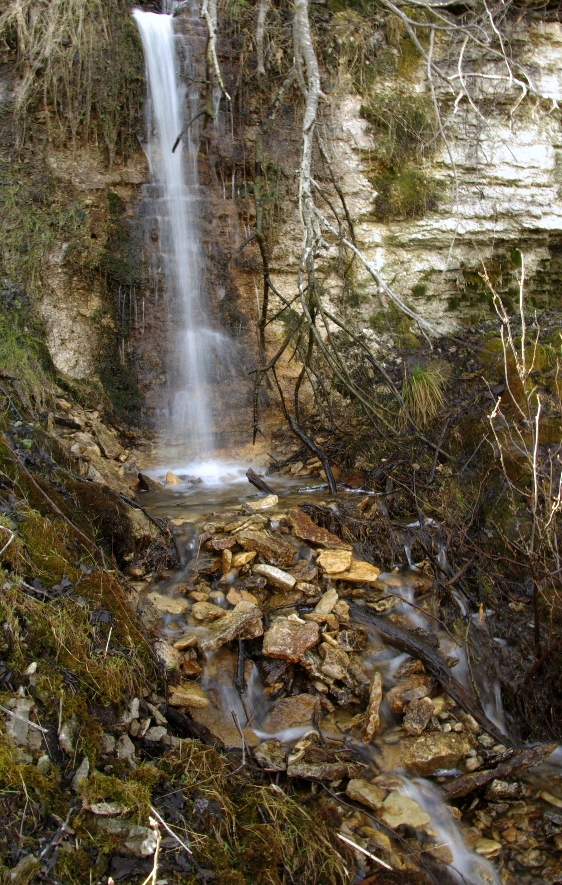 Põllküla juga asub Harjumaal Paldiski linna alal Kersalu külas